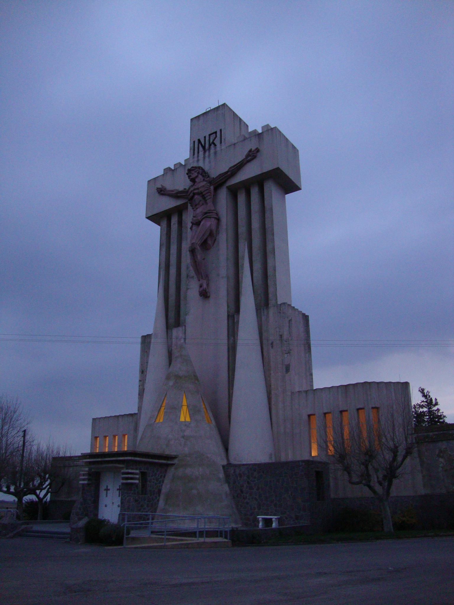 Pórtico del Cementerio de Laprida, en la Provincia de Buenos Aires. Obra del ingeniero y arquitecto Francisco Salamone, a cargo de numerosos proyectos durante la gestión del Gobernador Manuel Fresco, durante la década de 1930.